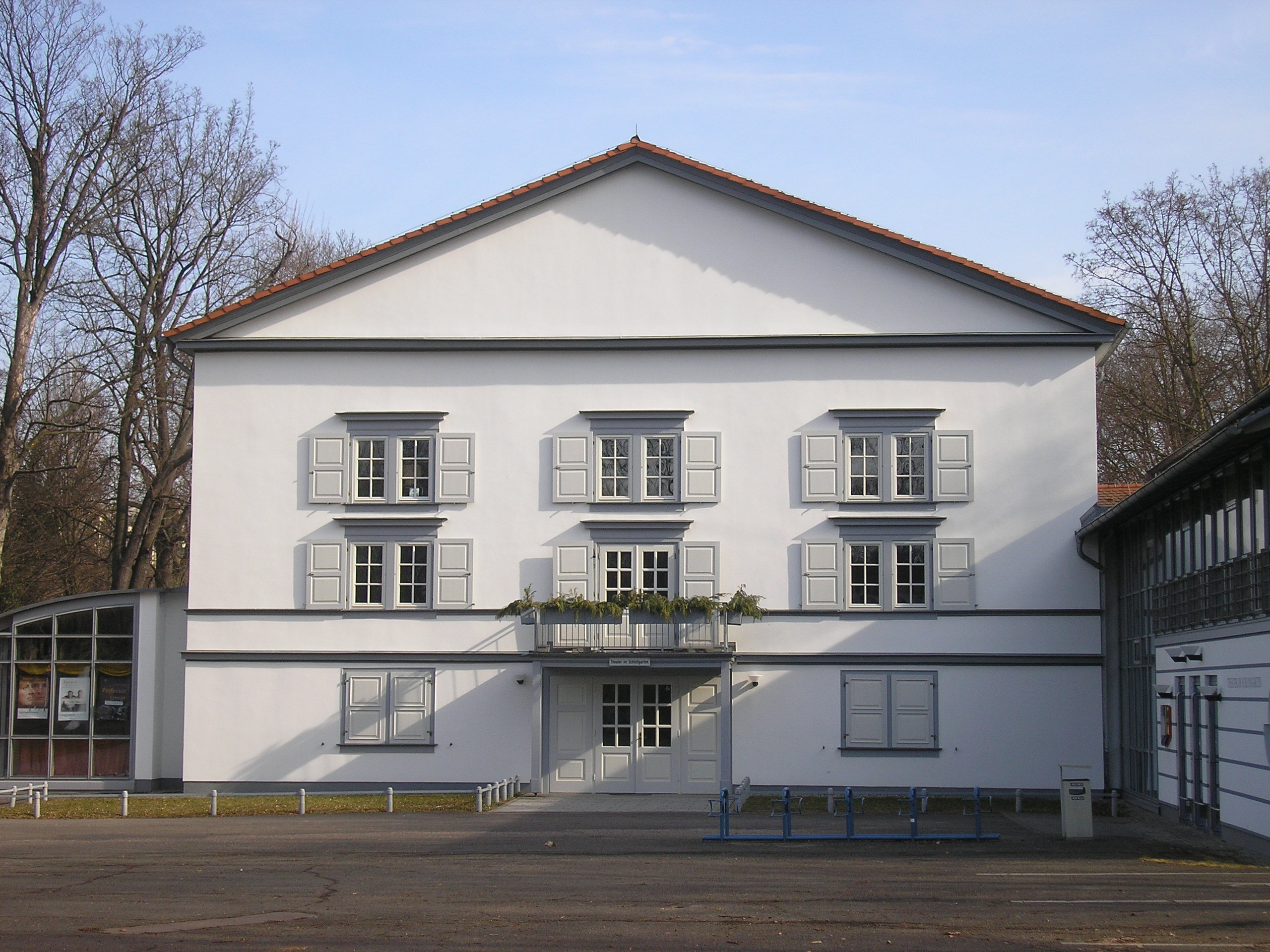 Das Theater in Arnstadt (Thüringen).